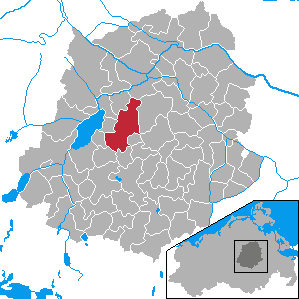 Borrentin, Landkreis Demmin, Mecklenburg-Vorpommern